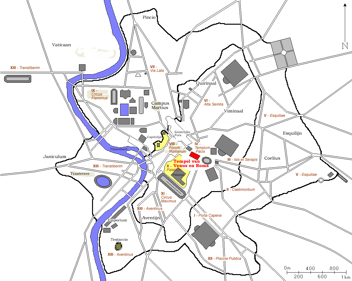 Kaart van antiek Rome waarop de Tempel van Venus en Roma is uitgelicht. Kaart is afkomstig van FR:wiki en door mij naar een Nederlandse versie bewerkt. Auteurs: nl::fr:User:ColdEel en Gebruiker:Joris1919